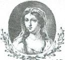 Wyszesława